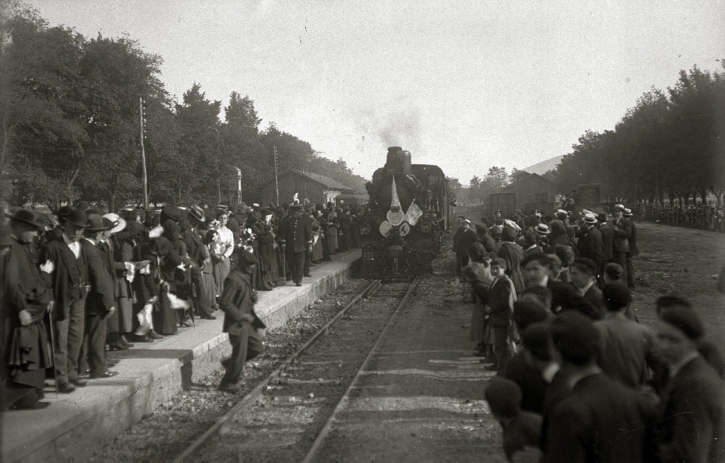 Título original: Multitud de personas esperando la llegada de un tren (1/1) Localización: Pamplona (Navarra)